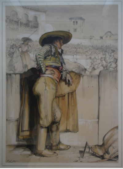 El picador en la Maestranza, Sevilla. Litografía coloreada. En Lewis´s Sketches of Spain & Spanish Character.